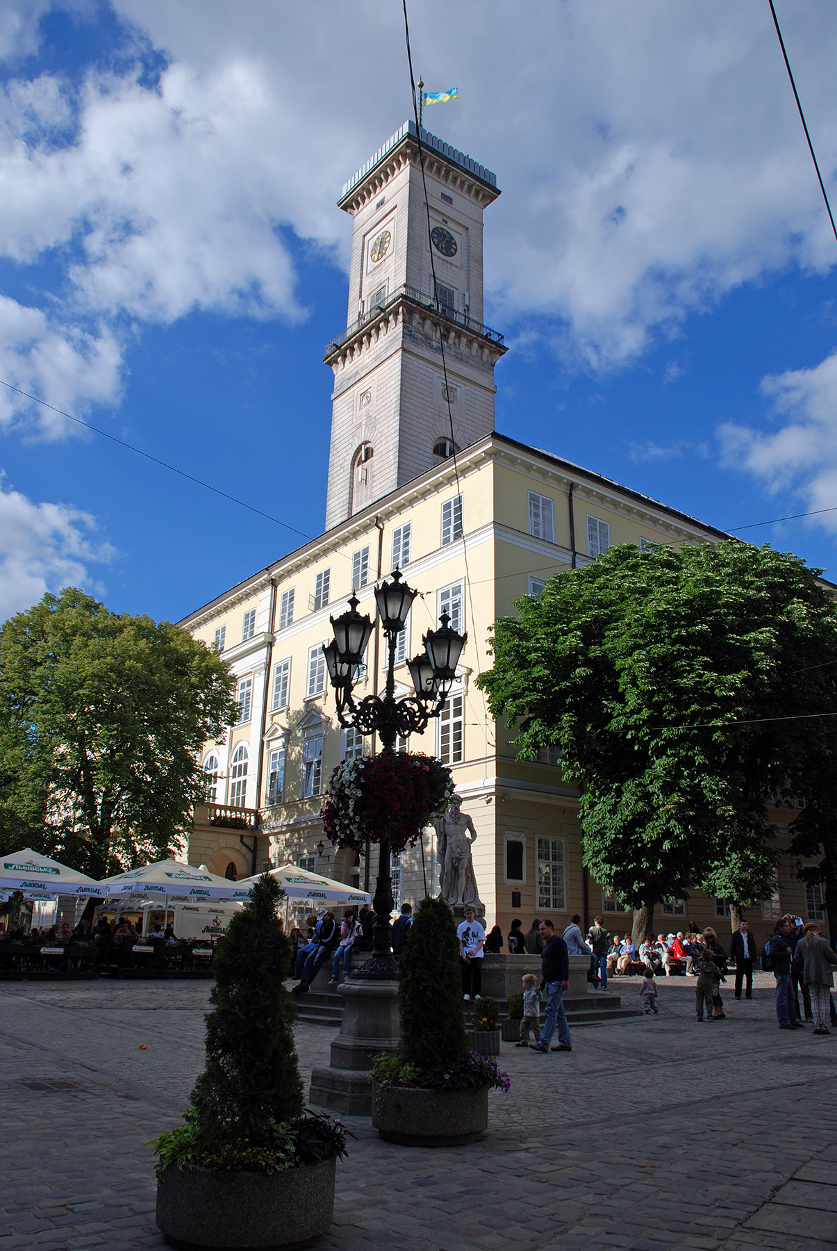 ратуша, Львів, Ринок пл., 1